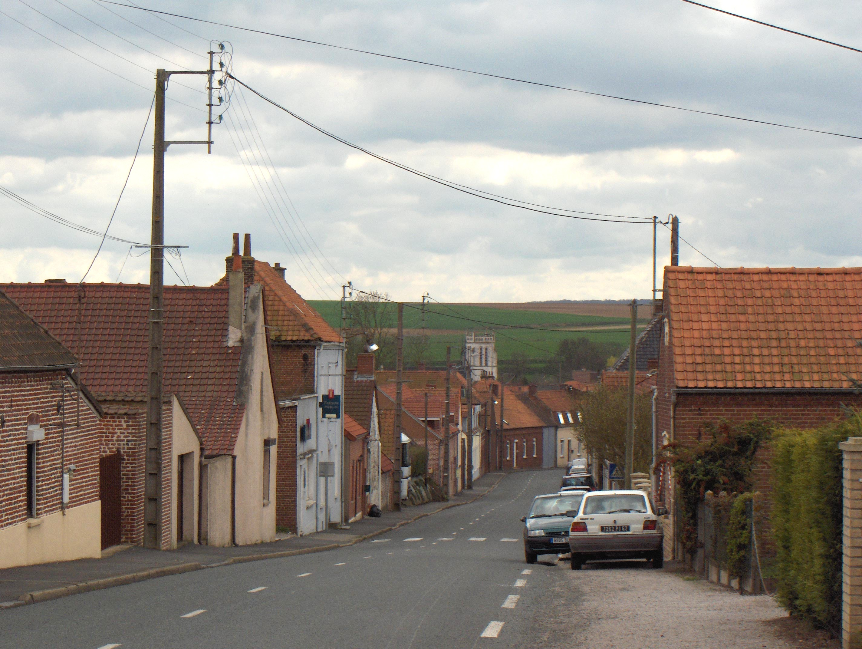 Thérouanne (Frankreich, Dept. Pas-de-Calais), heutiges Dorf am Südrand der zerstörten Stadt (Kirche aus dem 19. Jh.), Rue de Saint-Omer, Blick nach Süden.